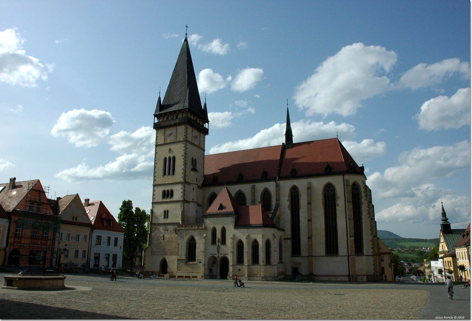 Chrám svätého Egídia, Bardejov